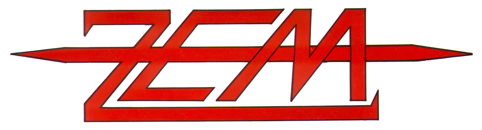 OTRS pending